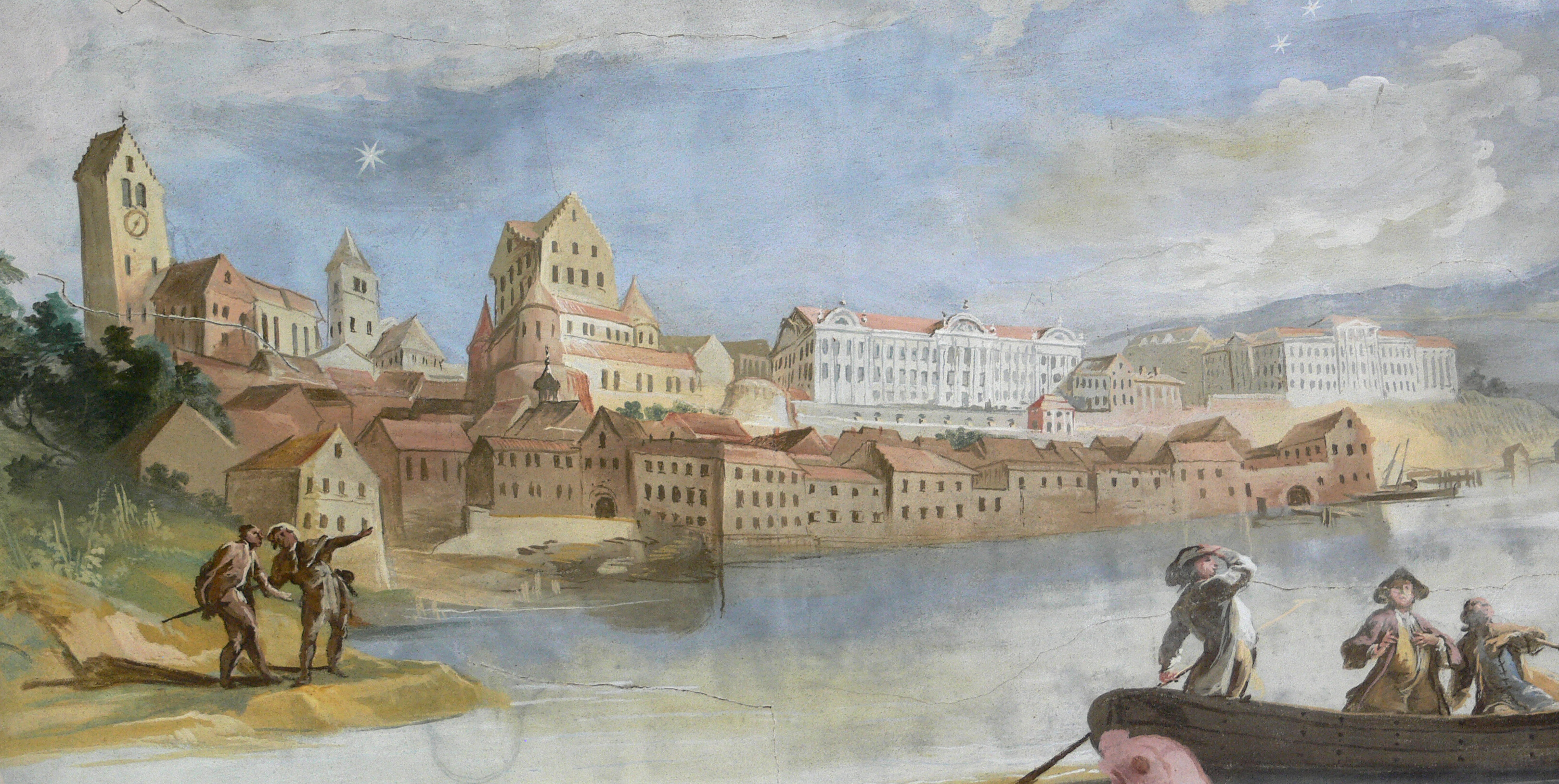 Wallfahrtskirche Maria zum Berge Karmel, Baitenhausen, Stadt Meersburg, Bodenseekreis Fresken von Johann Wolfgang Baumgartner, 1760 Querhausfresko links: „Meersburg“, Detail: Ansicht von Meersburg